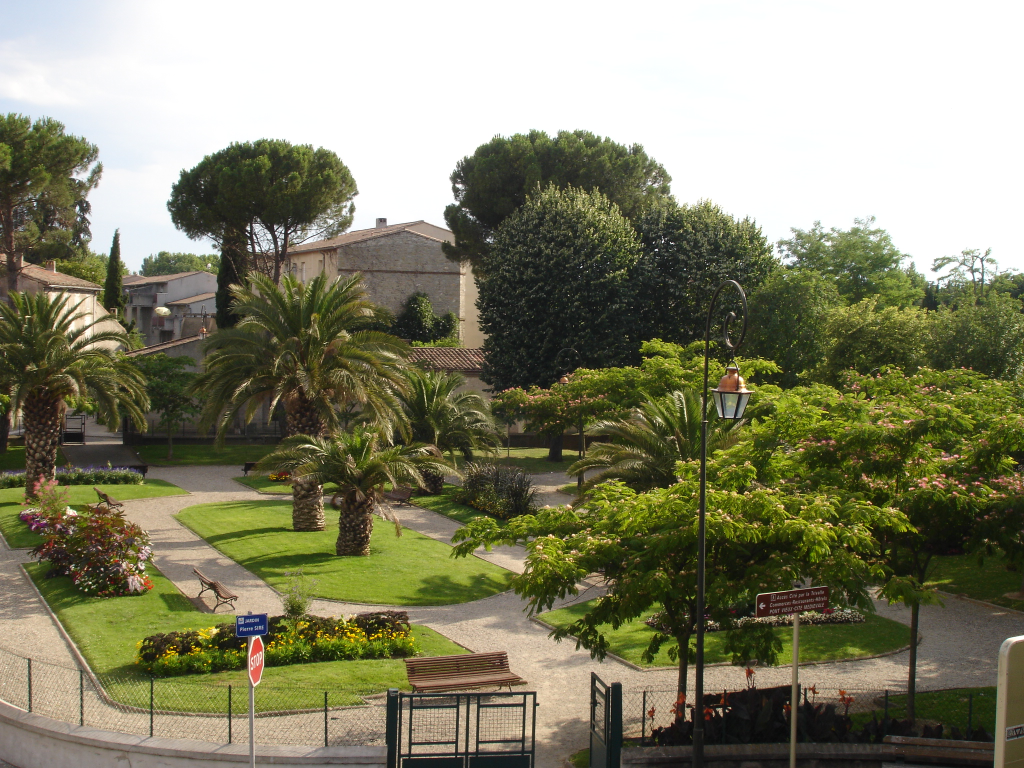 France, Aude (11), Carcassonne, jardin maria et pierre-Sire